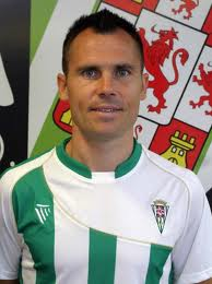 Gerardo en el Córdoba